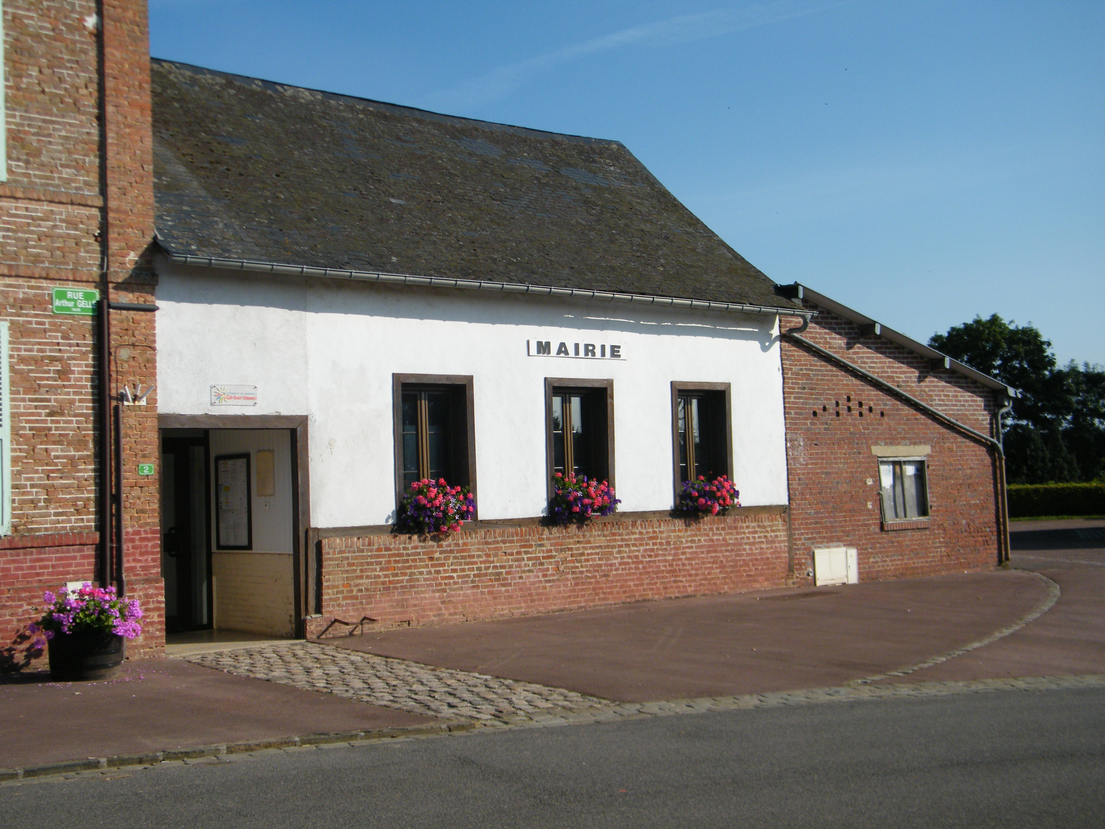 Mairie.